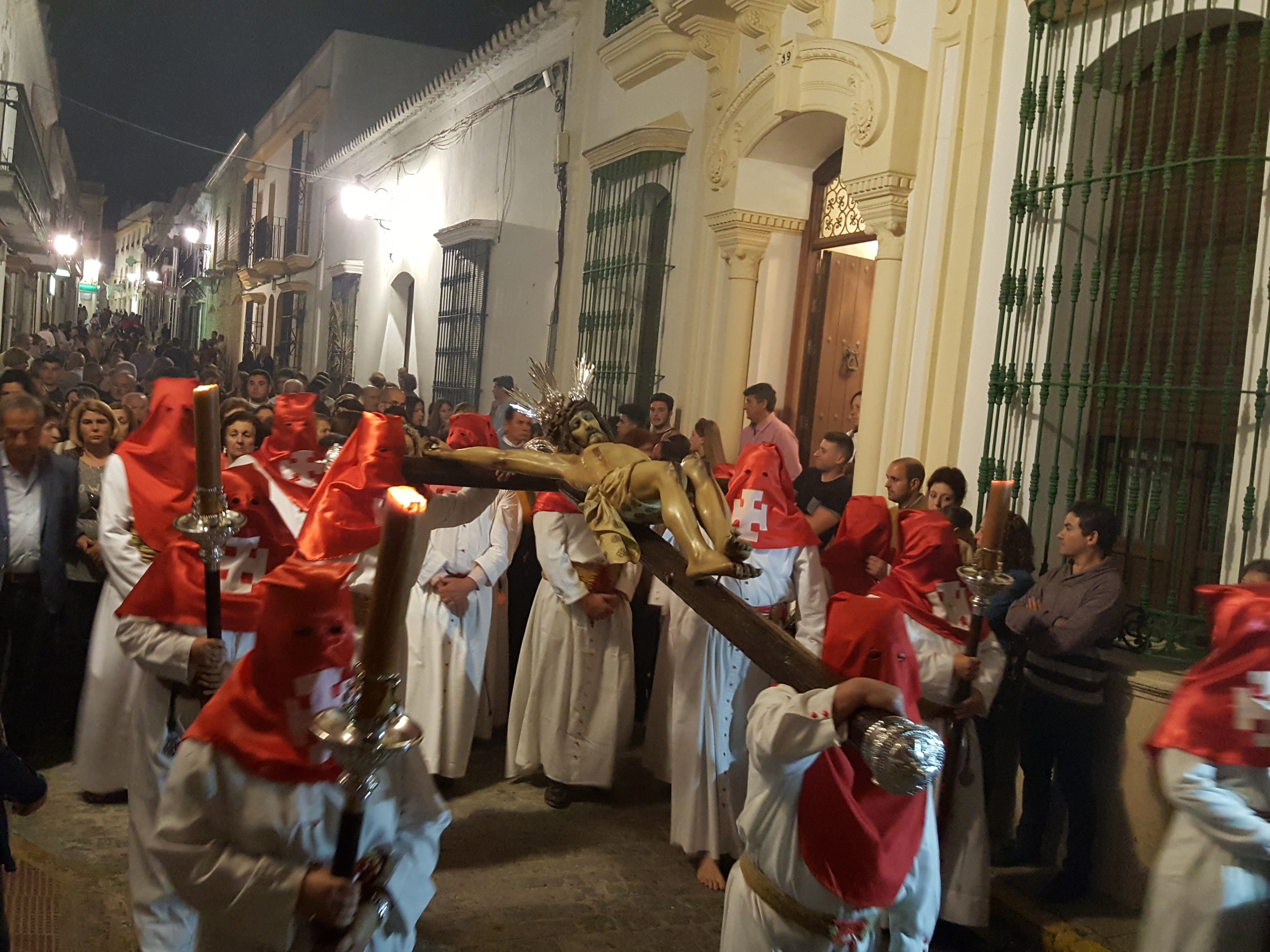 Hermandad del Cristo de la Sangre. Desfile procesional del Martes Santo. Vista del Cristo de la Sangre por el casco urbano de Moguer.